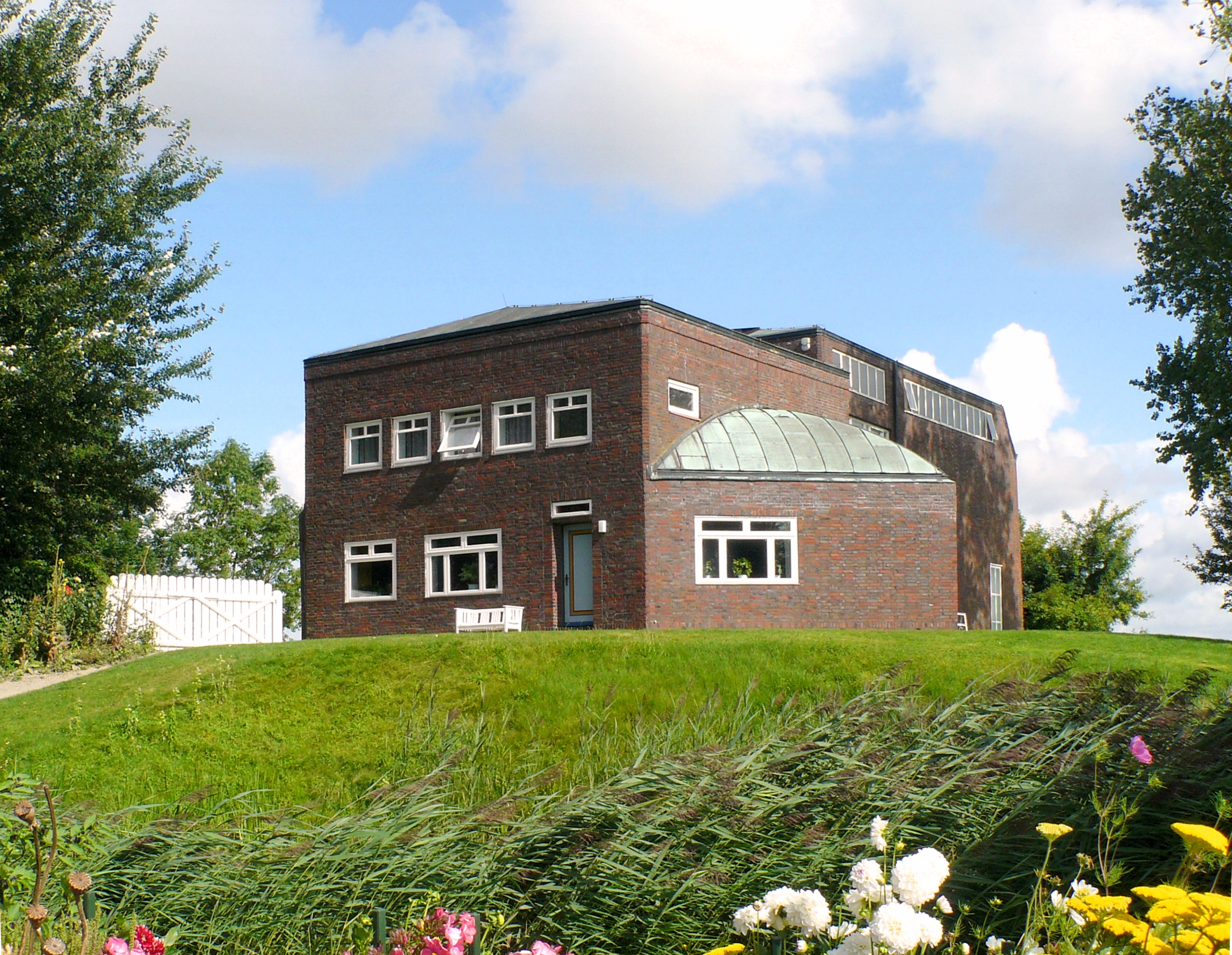 Nolde-Haus Seebüll